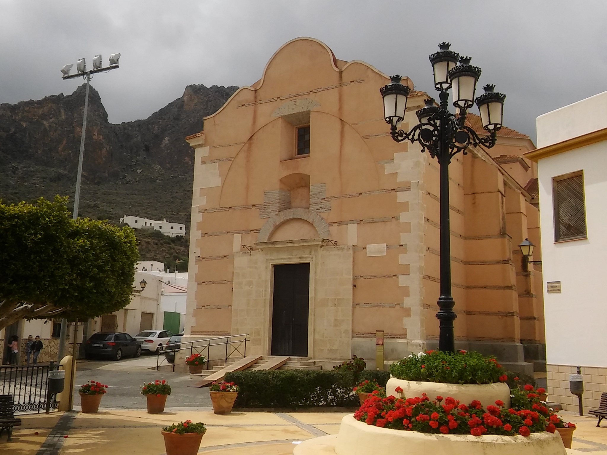 Lucainena de las Torres, Almería. Iglesia Nuestra Señora de Monsión